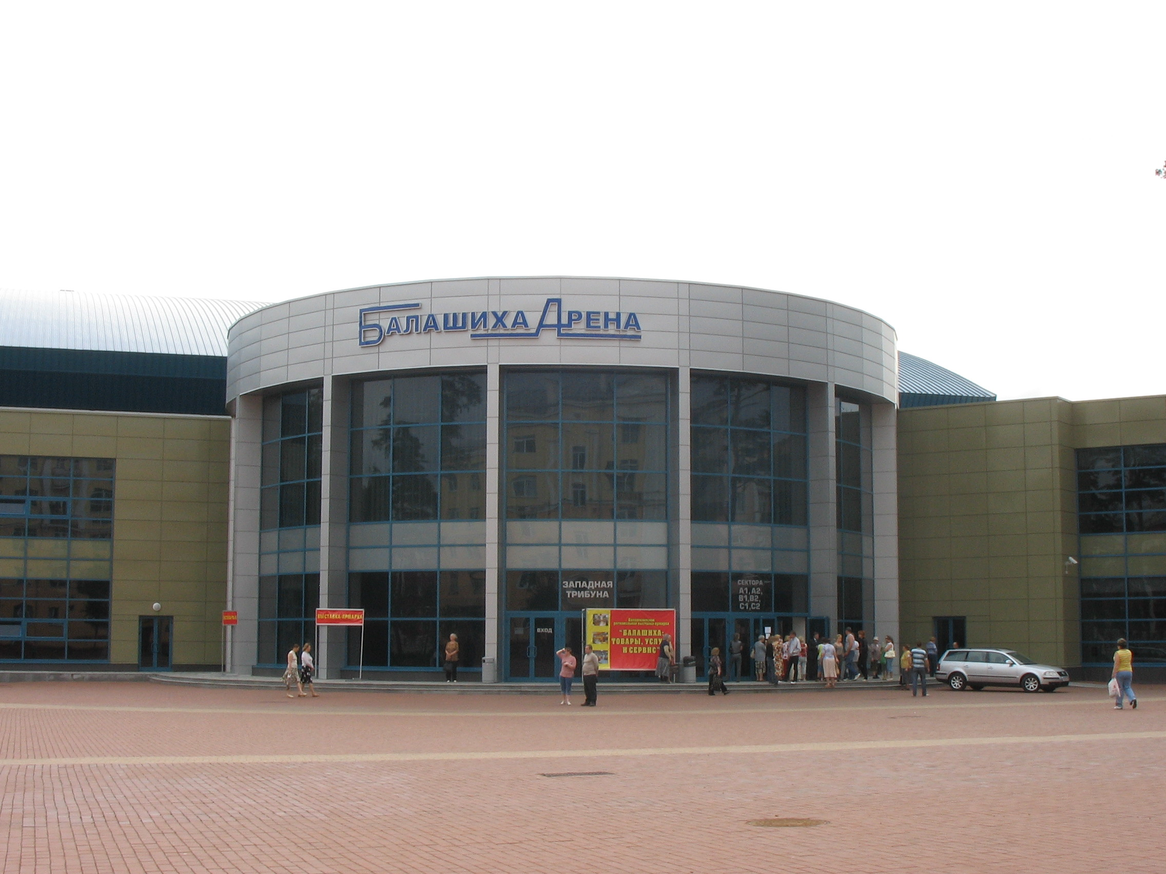 Балашиха-арена